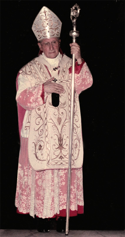 Le cardinal italien Giovanni Canestri